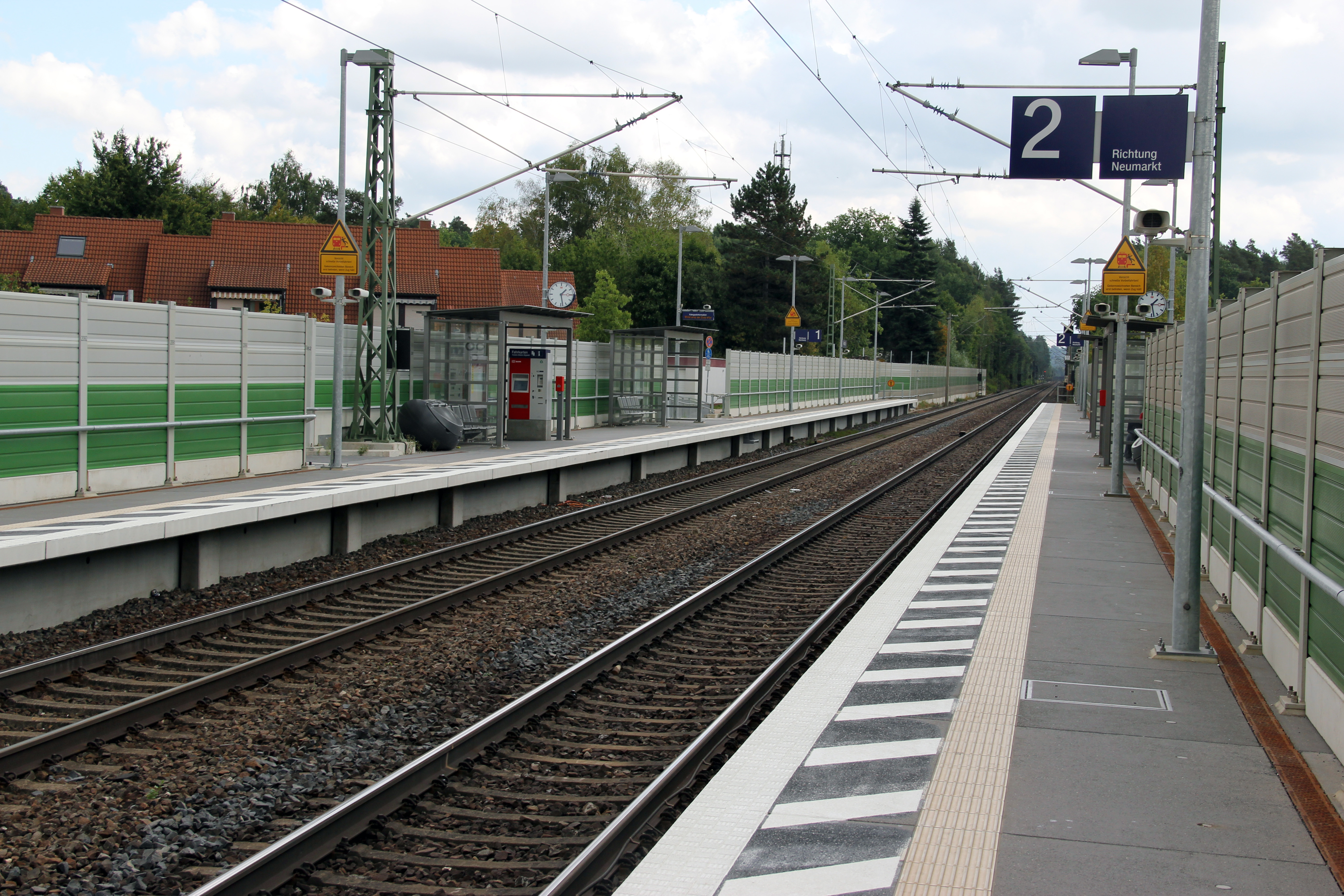 S-Bahn Haltepunkt Feucht Ost